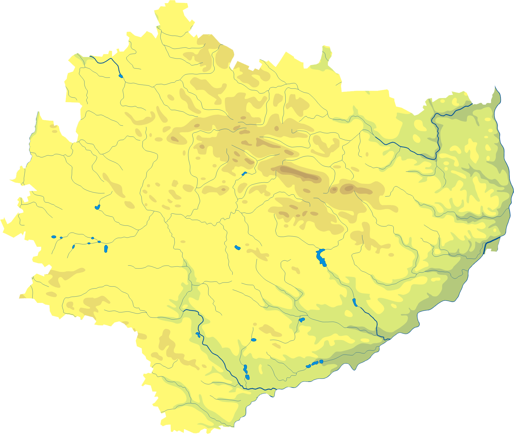 Mapa wód i ukształtowania powierzchni województwa świętokrzyskiego. Autor: AotearoaWspółrzędne graniczne mapy: N: 51.3425° N S: 50.1858° N W: 19.7044° E E: 21.8693° E Legenda